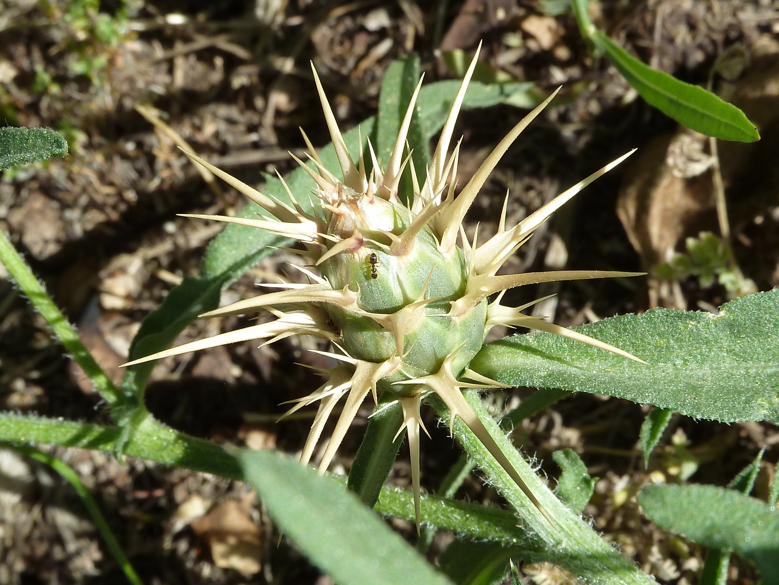 Centaurea calcitrapa (Abrojos) : Capítulo en pre floración - Parque del Planetario, Madrid (España).